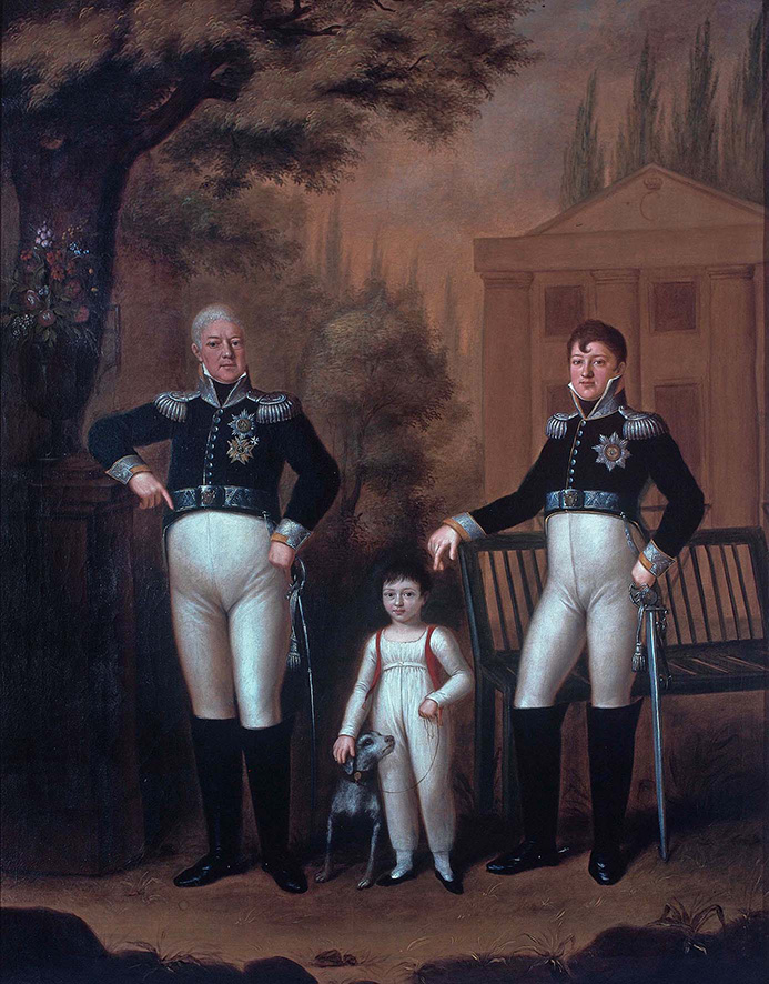 Herzog Ludwig ("Louis") mit seinem Sohn Adam und seinem Bruder Herzog Alexander